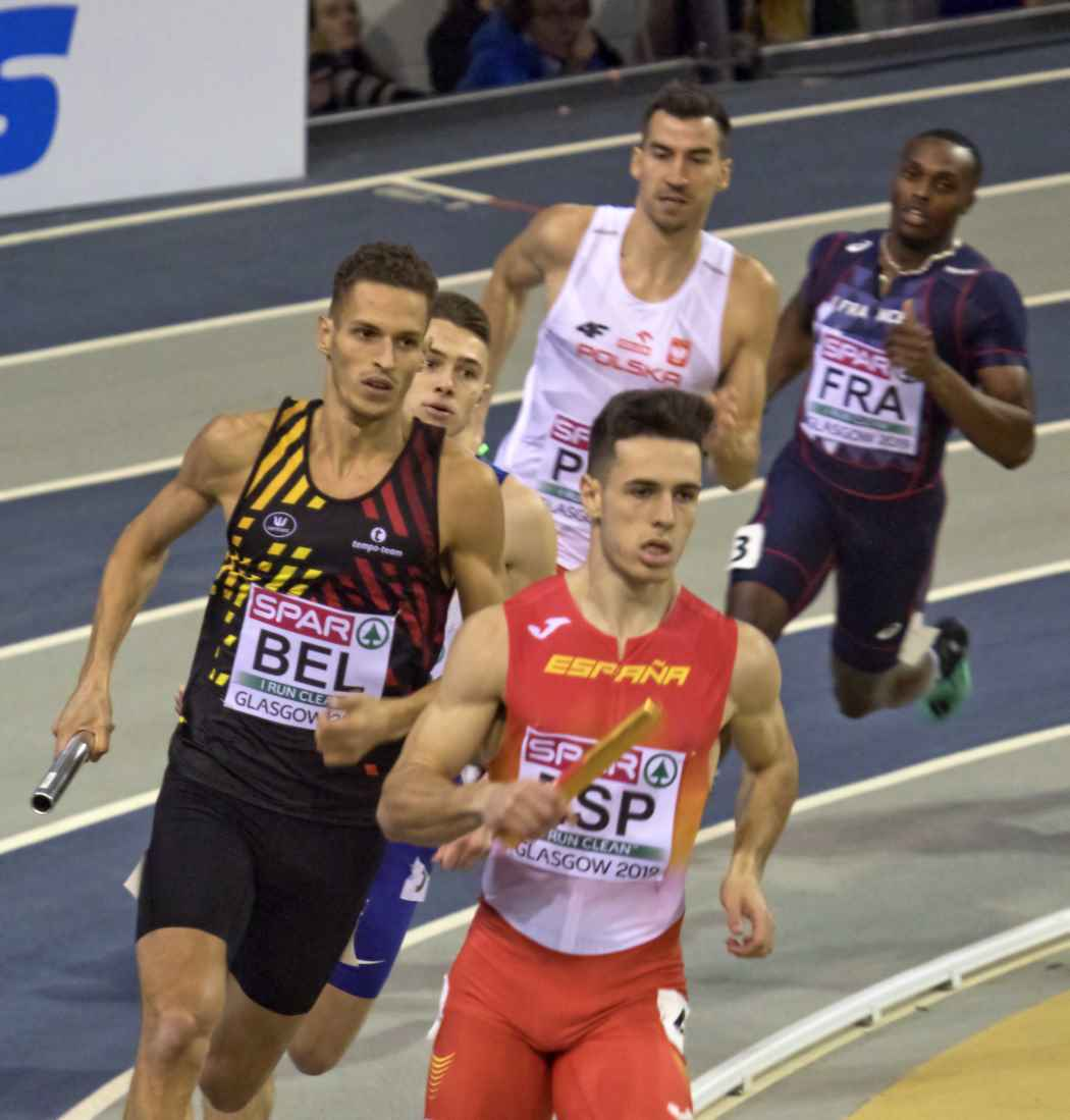 EKI30603 4x400m heren dylan borlée